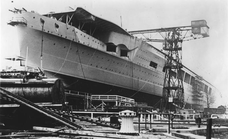 53090 Deutschlands erster Flugzeugträger Am 8. Dezember läuft in Kiel der erste Flugzeugträger der deutschen Kriegsmarine vom Stapel. Unser Bild zeigt die Backbordseite des neuen Flugzeugträgers. Bei Abdruck nennen: Scherl Bilderdienst, Berlin